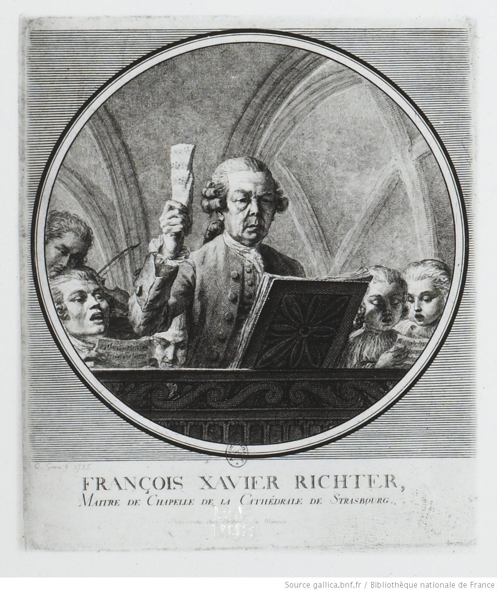 Depicted person: Franz Xaver Richter Franz Xaver Richter (1709–1789)